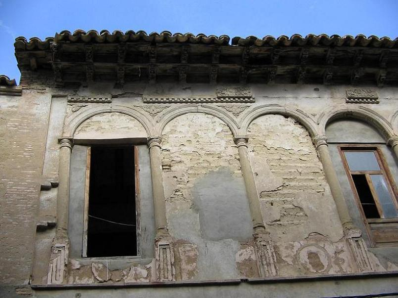 Detalle de los arcos y del alero del patio interior en el palacio de Ayerbe. Palacio de Ayerbe